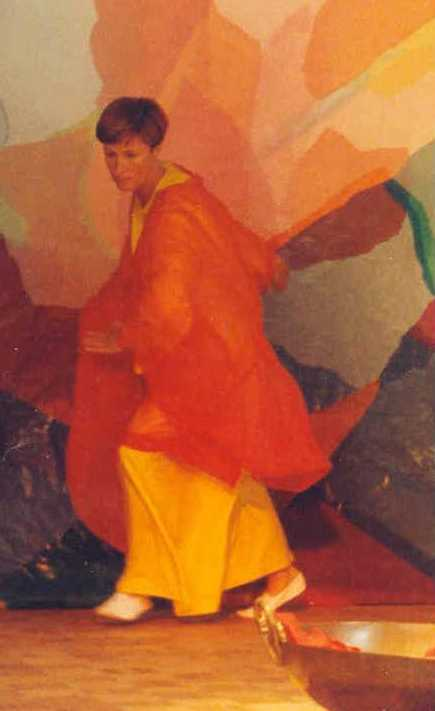 euritmie bewegingskunst